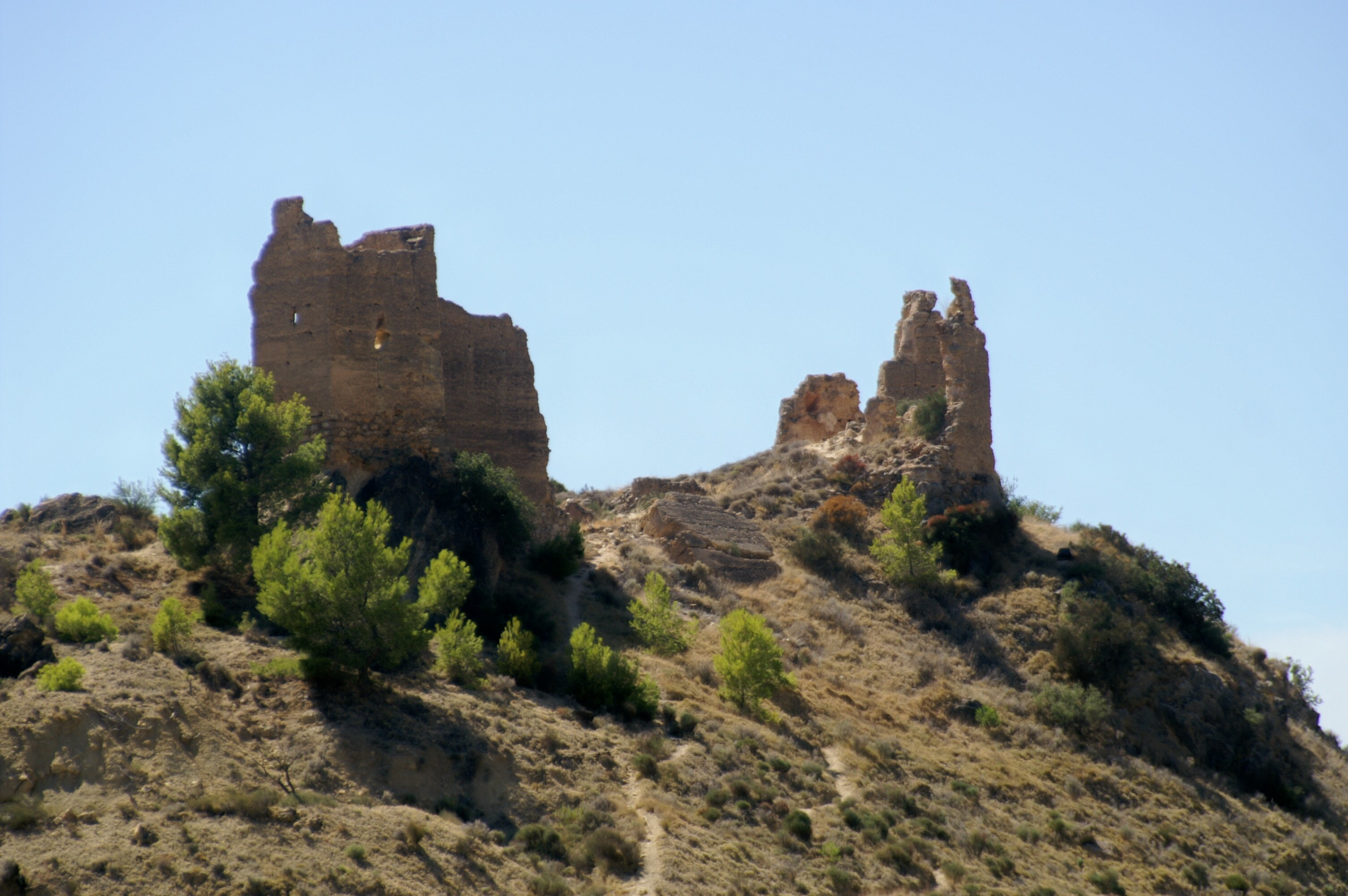 Castell de Relleu (Relleu, la Marina Baixa, País Valencià)